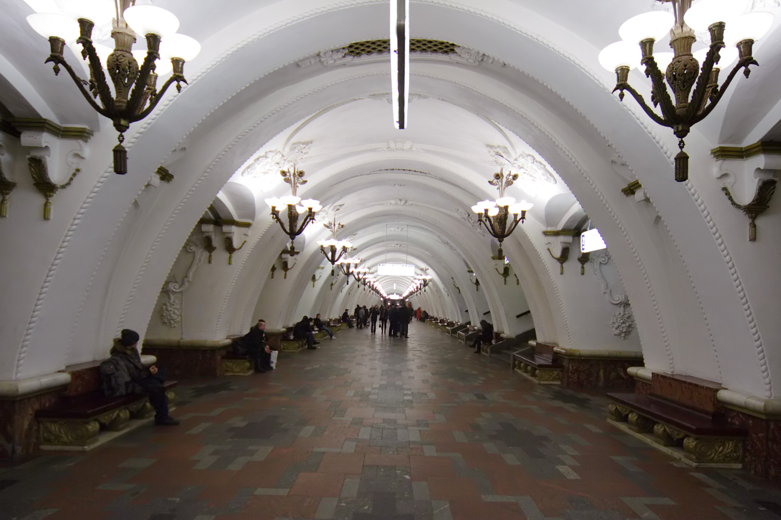 Arbatskaya Metro Station in Moscow (Arbatsko-Pokrovskaya Line)